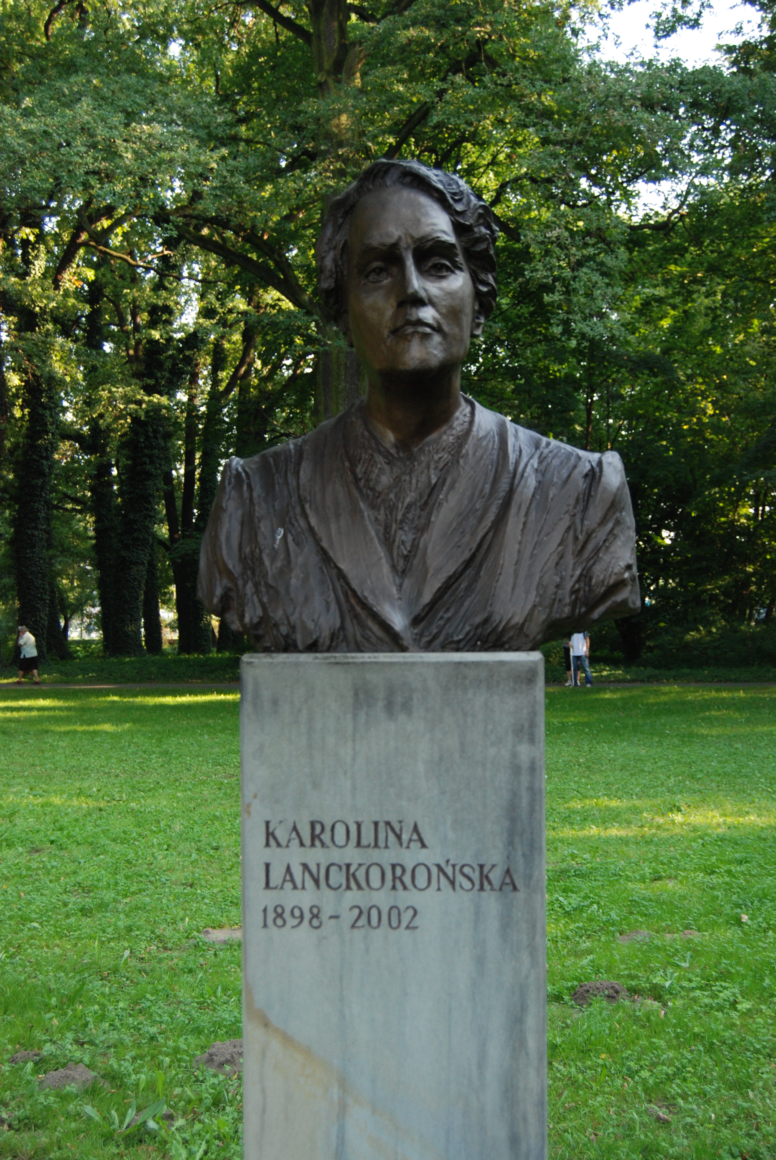 Pomnik prof. Karoliny Lanckorońskiej w Parku Jordana w Krakowie.